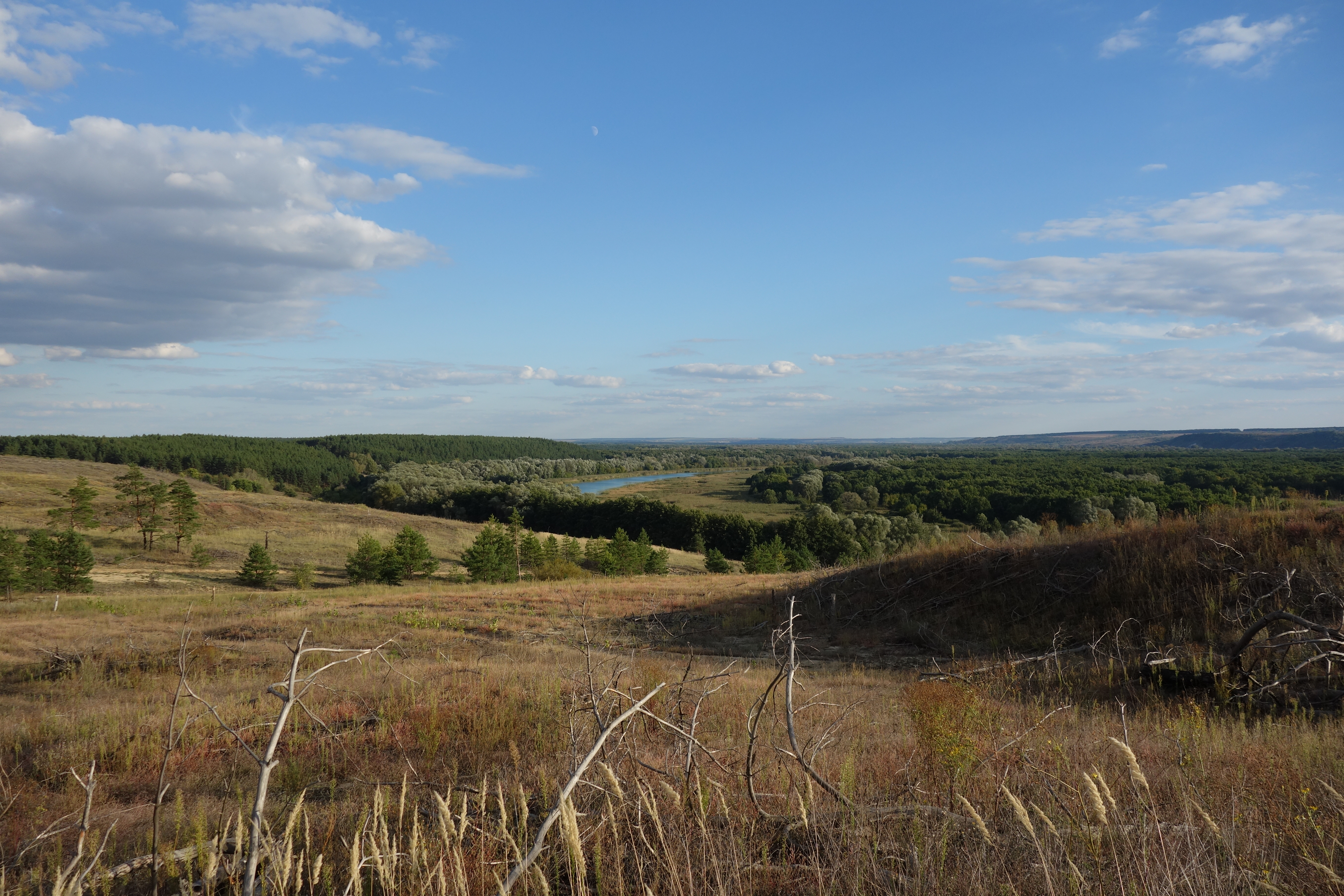 Березняговский лесной массив: Берег р. Дон. Новолиманское сельское поселение, Петропавловский район, Воронежская область This image is related to the protected area of Russia number 3610421